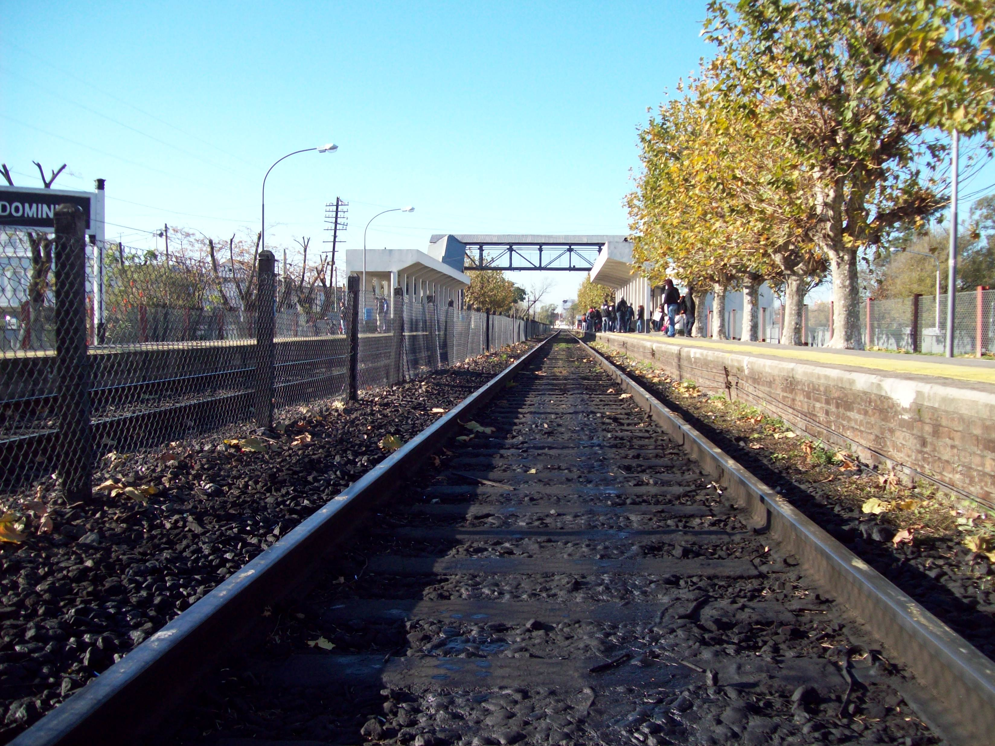 Estación Villa Dominico del ferrocarril General Roca (ramal Quilmes), mirando hacía la estación Wilde.